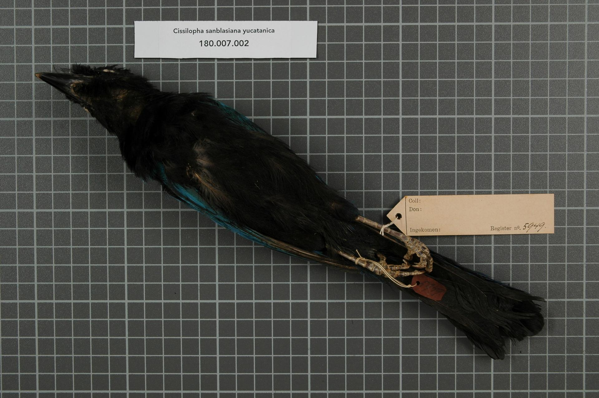 Cissilopha sanblasiana yucatanica (Dubois, 1875)